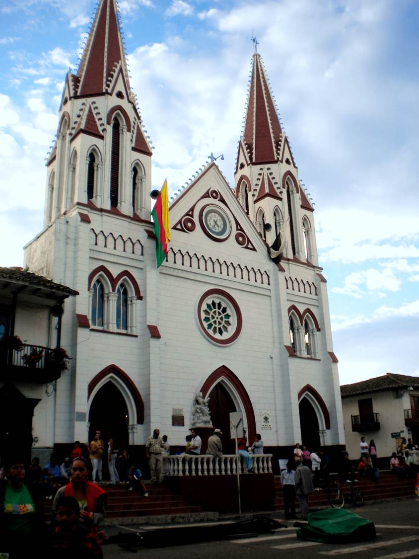 Las torres construidas en 1939 son la muestra del valor artístico de la Ciudad de Dios.